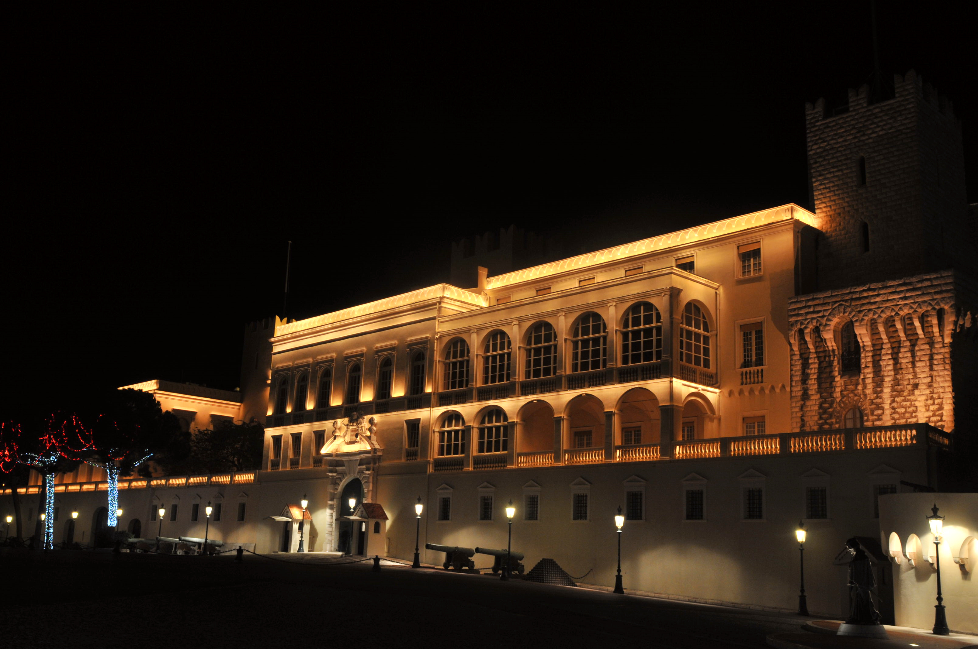 Monaco, le palais, la nuit en décembre